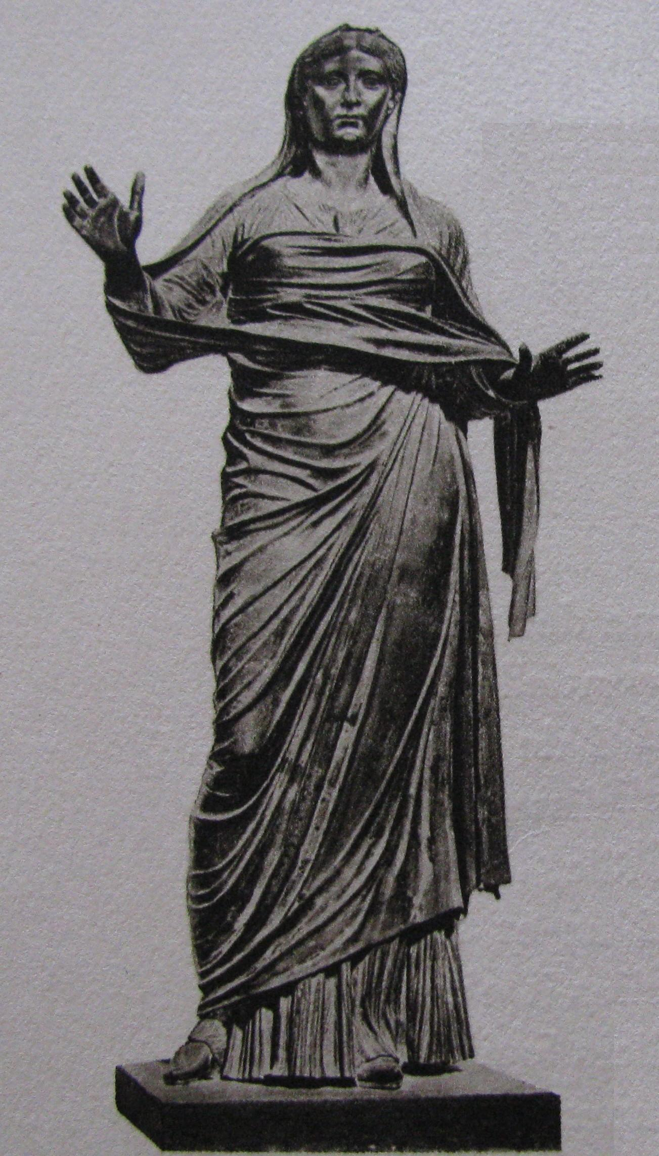 Statua in bronzo di Livia